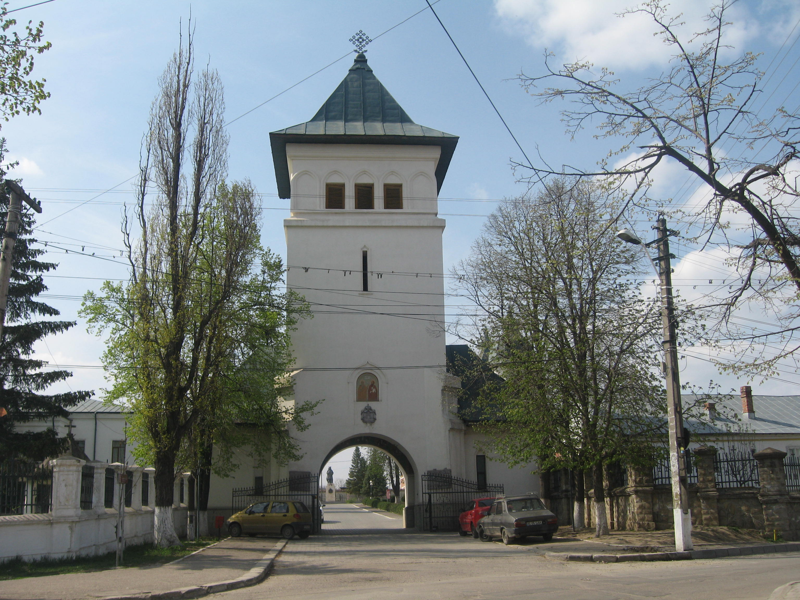 Catedrala episcopală din Huși